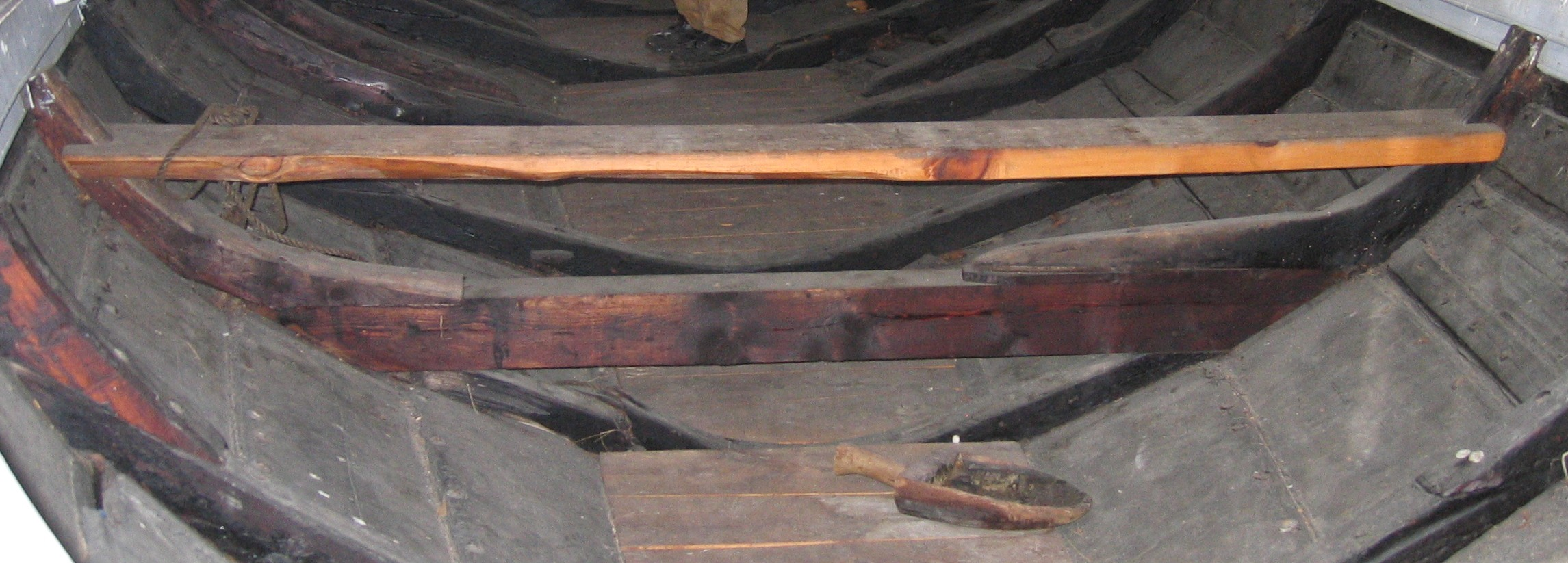 Tofte med bete.